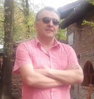 Српски (ћирилица): Радован Антонијевић